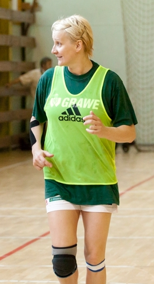 Bernadett Ferling